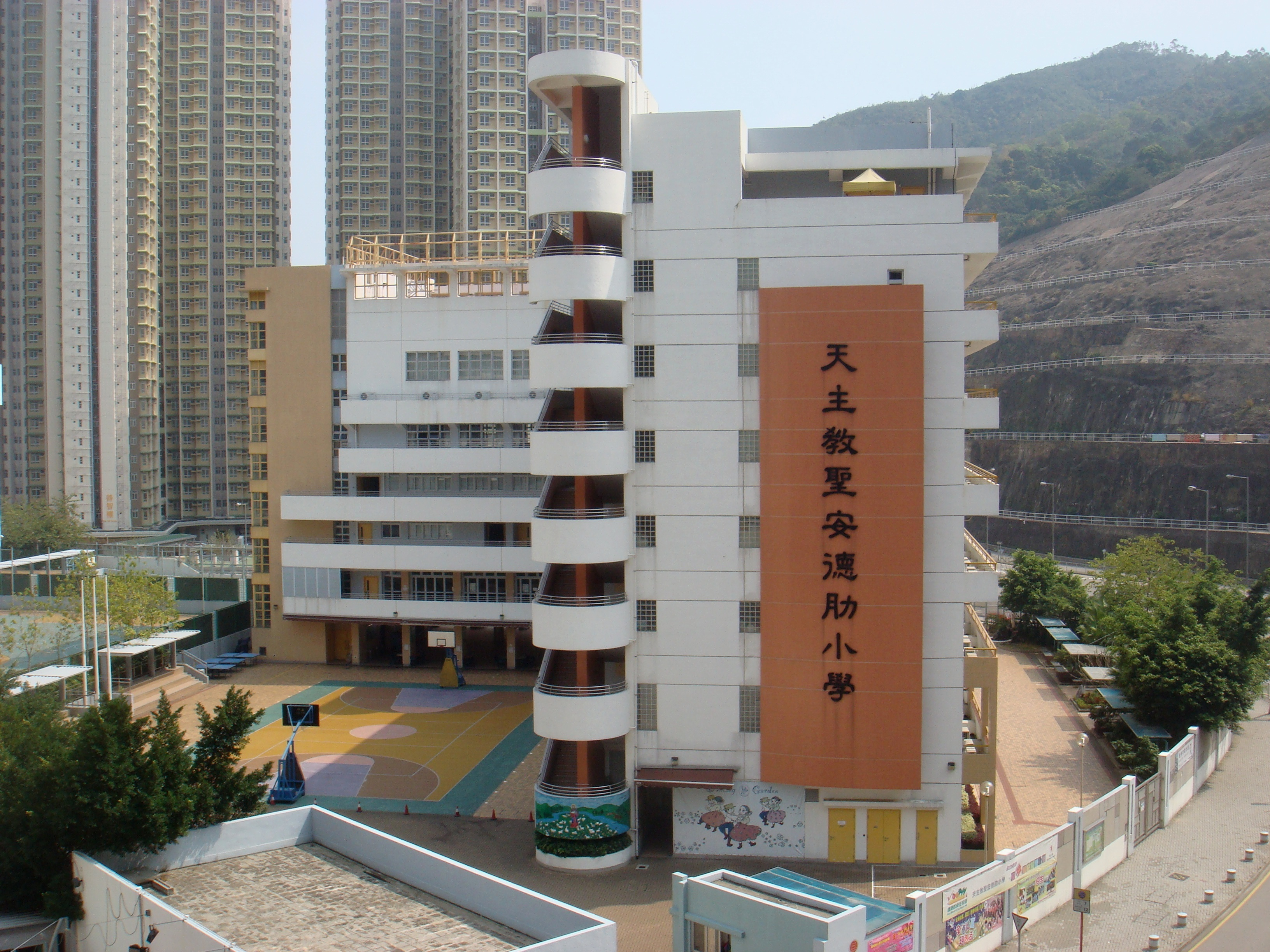 天主教聖安德肋小學